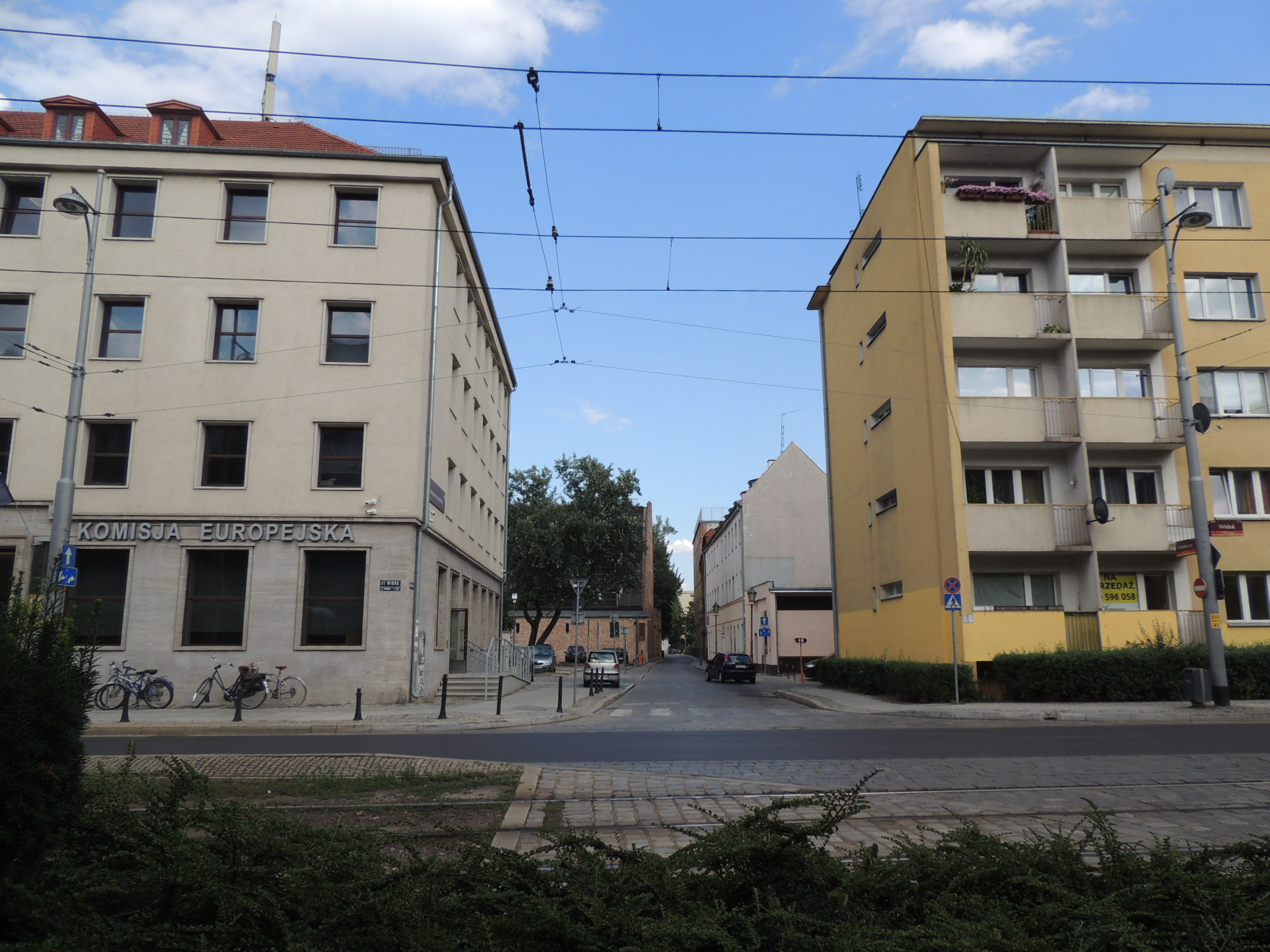 Ulica Widok we Wrocławiu, ulica Mennicza we Wrocławiu